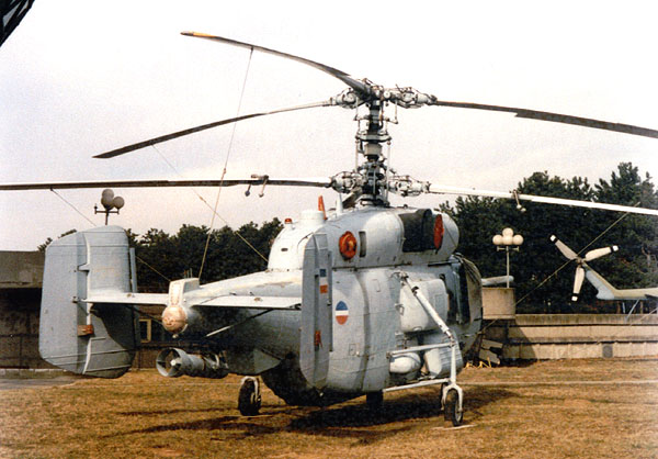 Камов Ка-28. Фотографију направио корисник Краљевић Марко испред Музеја ваздухопловства.